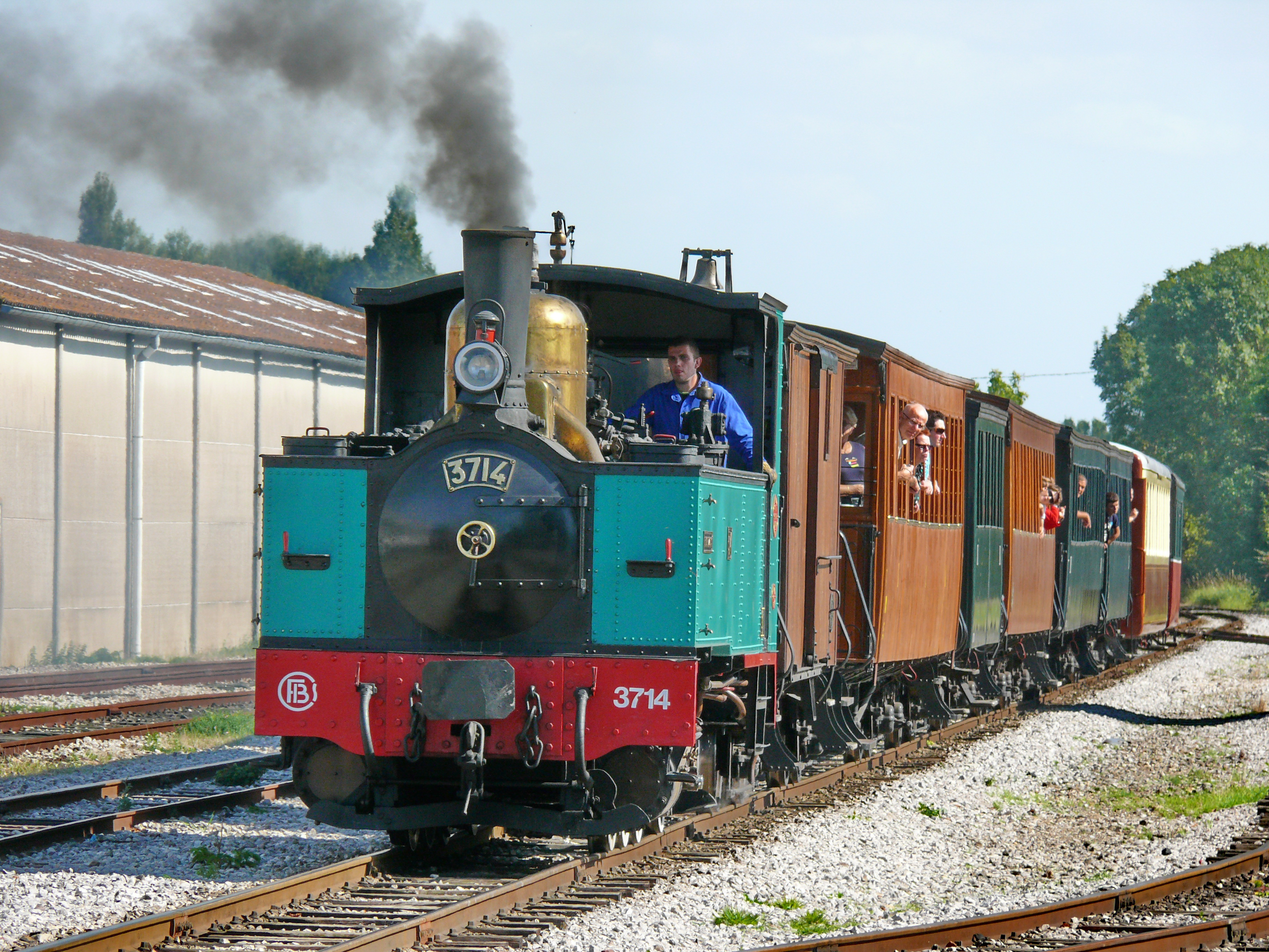 Rame tractée par la locomotive Buffaud & Robatel n°3714 ex Seine-et-Marne traversant le dépôt de Saint-Valery Canal